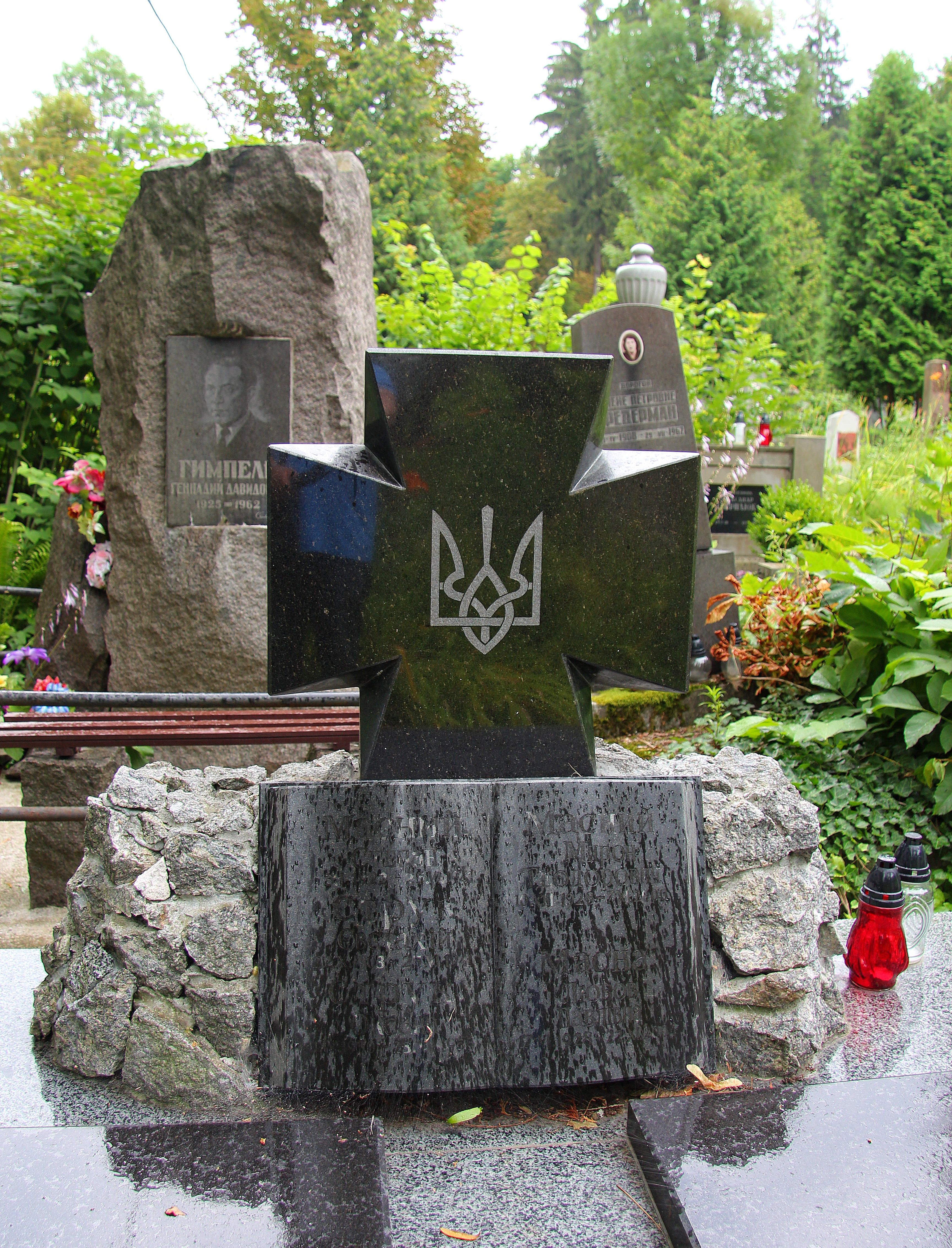 Пам'ятник на могилі Є. Струка.Личаківський цвинтар , поле № 84.